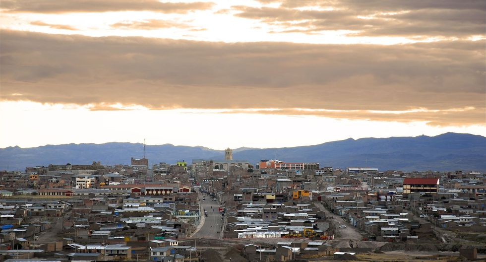 Foto de la ciudad de Yauri - Espinar, región Cusco, Perú.